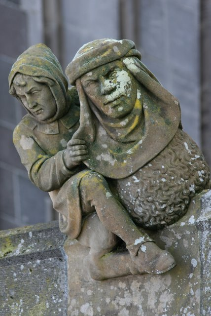 Luchtboogbeeldje op de Sint Janskathedraal, Den Bosch